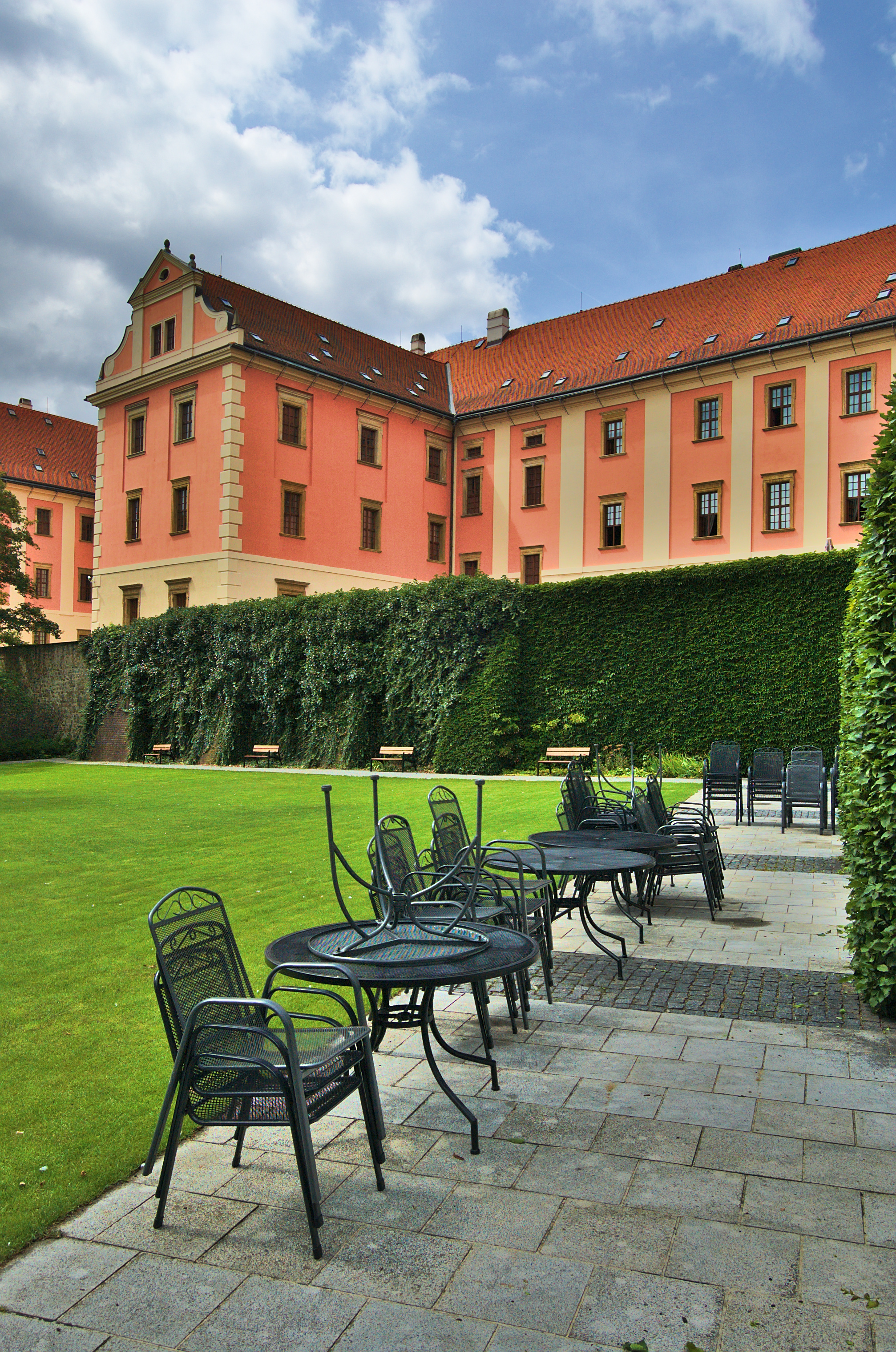 Bývalý jezuitský konvikt, Olomouc